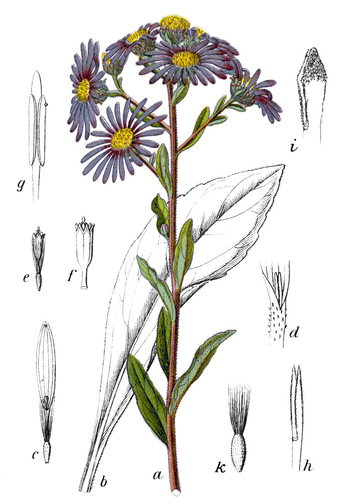 Berg-Aster, Aster amellus